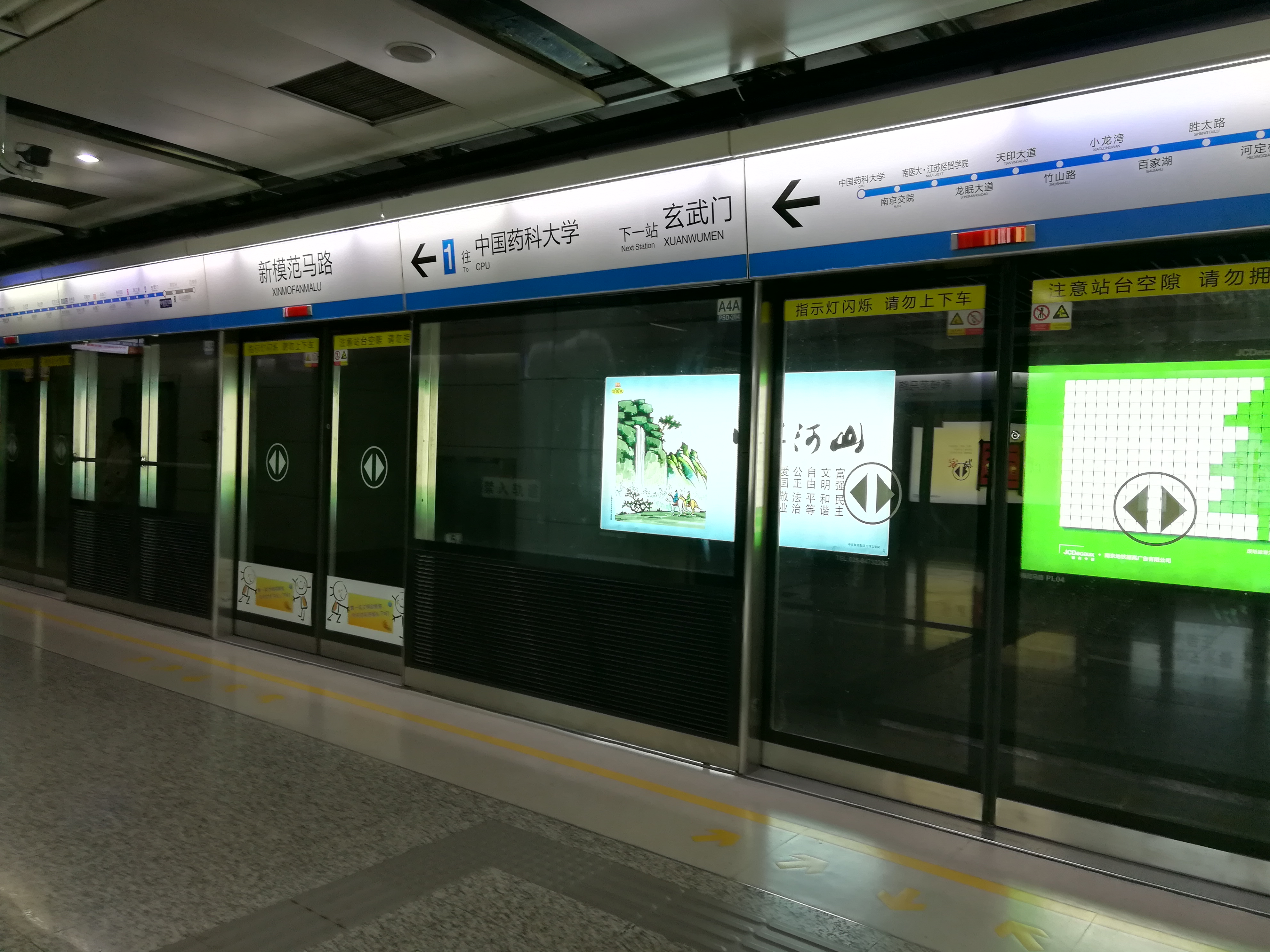 新模范马路站，2018年6月